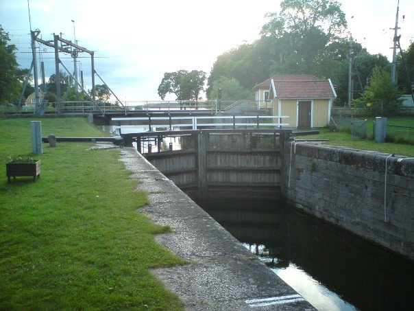 Slussen i Norsholm och Norsholmsbron över Göta Kanal vid Norsholm juni 2009